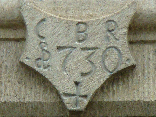 Datierung am hist. Erbhof in Heilbronn-Sontheim